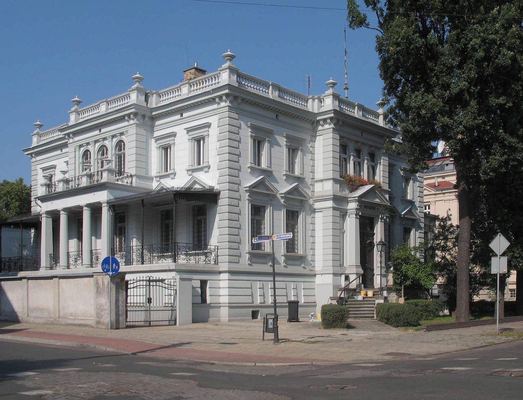 Nowa Sól, ul. Muzealna 20 - budynek muzeum, mur., kon. XIX w. (zabytek nr 2210 z 4.05.1976)